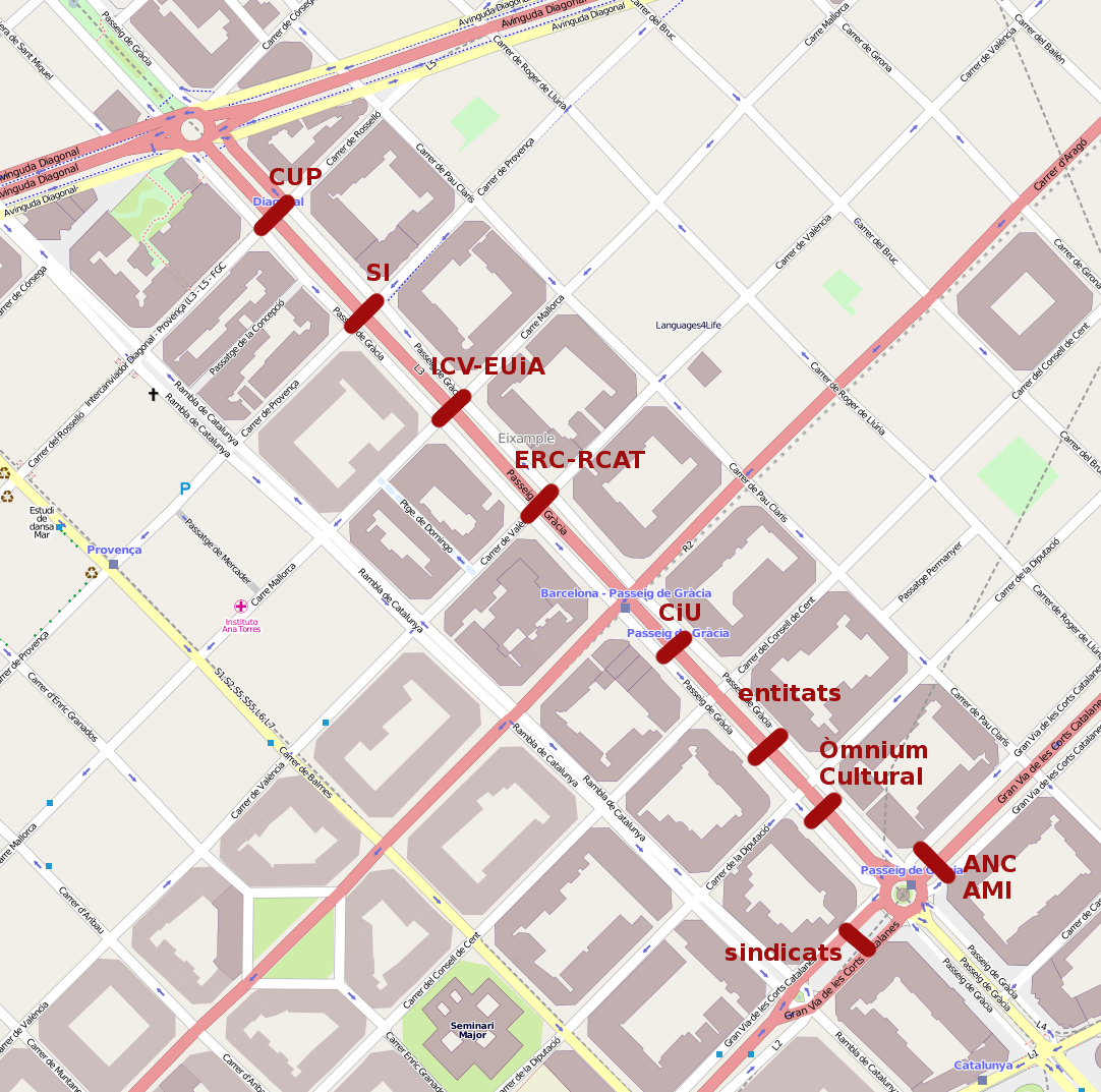 Els diferents blocs de la mani. Font: Vilaweb This map may be incomplete, and may contain errors. Don't rely solely on it for navigation.